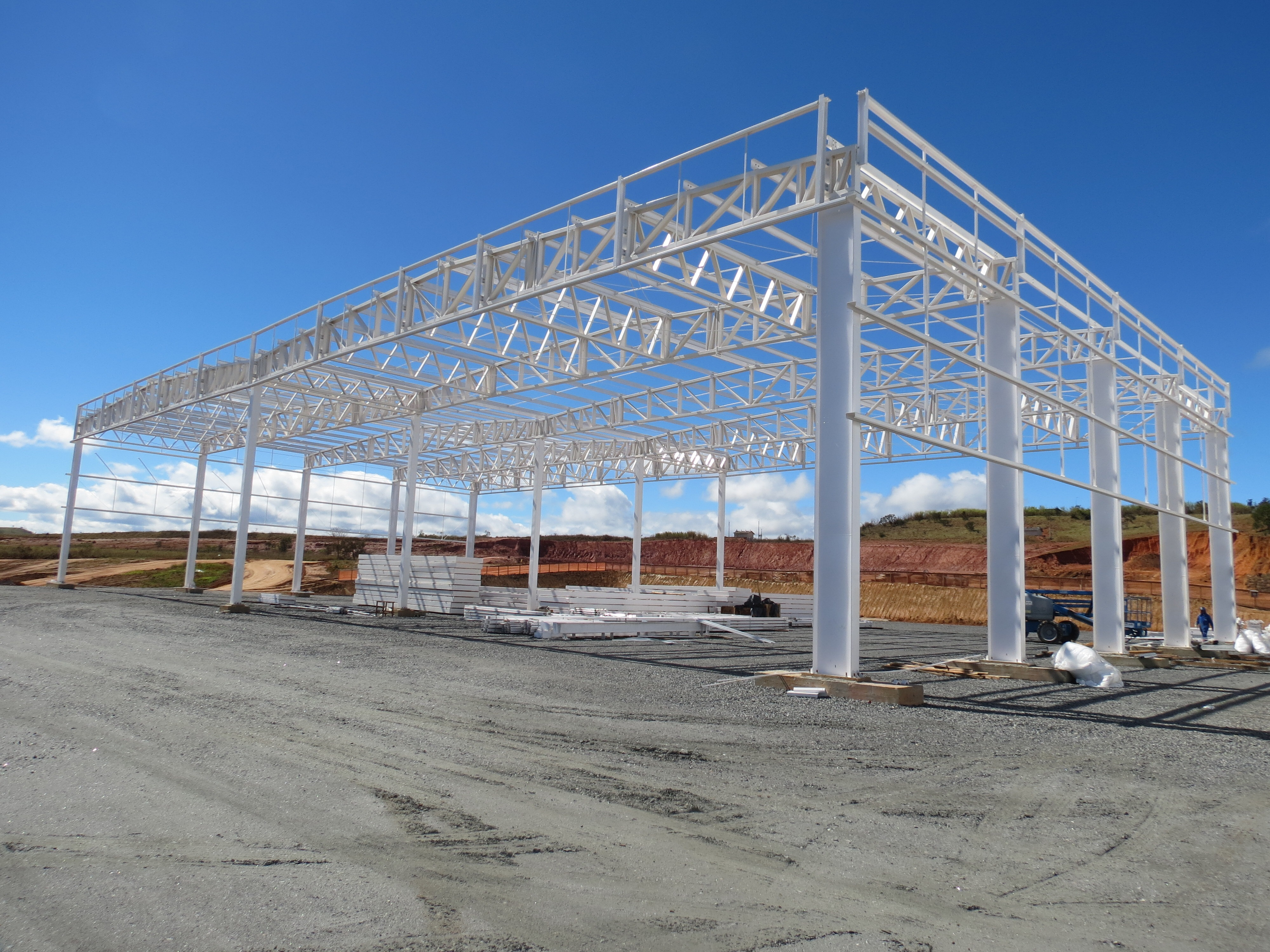 Hangaretes do Projeto 32 - Foto Set 2014. Os hangaretes serão formados por vigas metálicas treliçadas em perfis dobrados a frio, em 04 águas, vencendo vãos de 26m, apoiadas em pilares metálicos formados por perfis tipo caixão, com pé direito de 8,5 m. As terças de cobertura e de fechamento lateral serão em perfis formados a frio, vencendo vãos de 7,0 m, com platibanda em todo o perímetro do galpão.